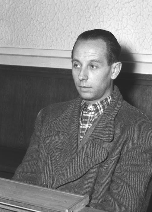 Zentralbild/ Quaschinsky 23.5.52 Prozeß gegen Agentengruppe Vor dem Obersten Gericht der DDR begann am 23.5.52 ein Prozeß gegen eine Bande von Agenten und Saboteuren, die sämtlich der westberliner Hildebrandt-Gruppe gegen die Menschlichkeit angehören. Unter anderem planten die Angeklagten, die Eisenbahnbrücke in Berlin-Erkner mit dem darüber fahrenden "Blauen Express" zu sprengen. UBz:Der Angeklagte Johann Burianek.